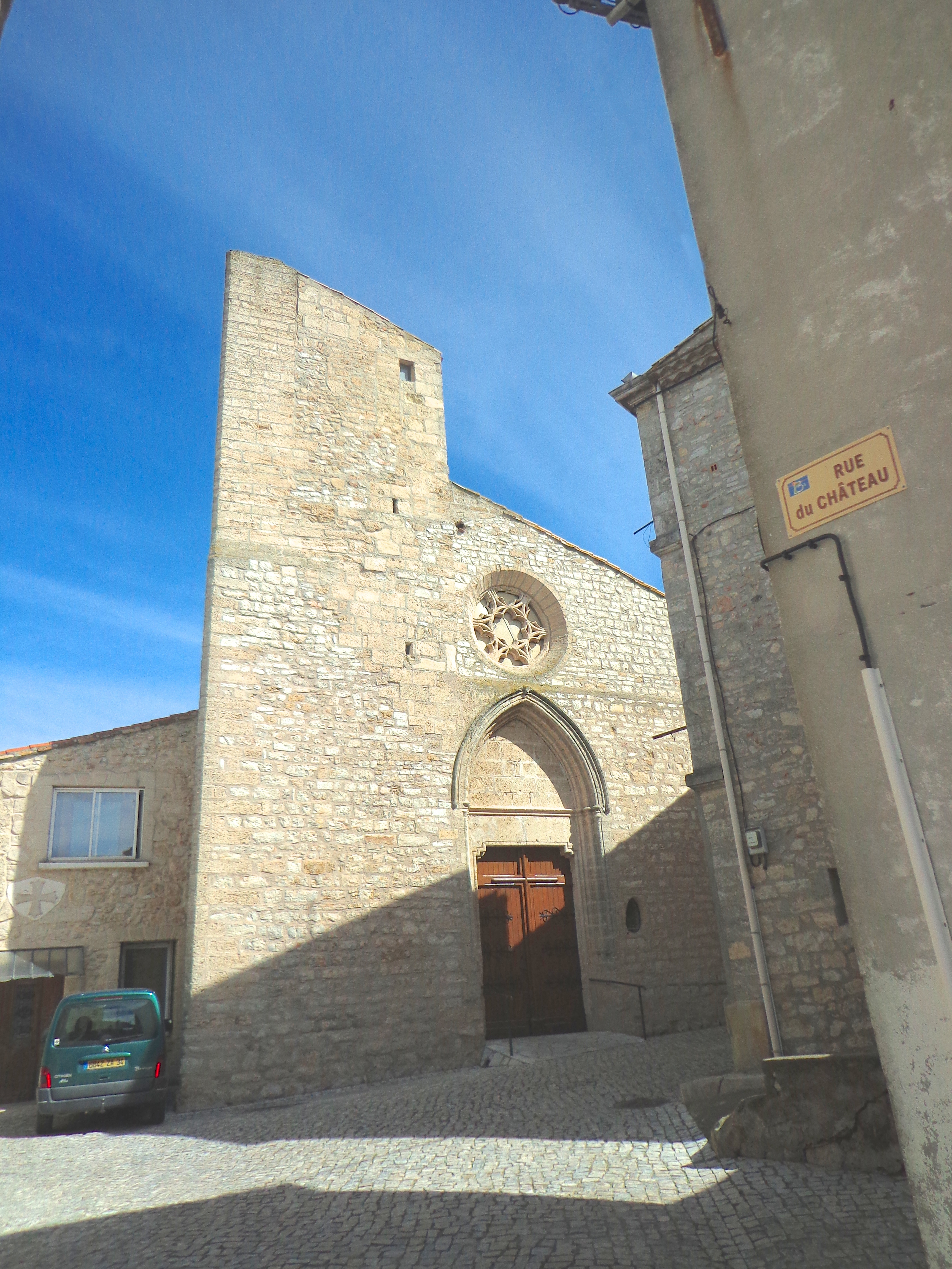 Balaruc-le-Vieux (Hérault), façade de l'église Saint-Maurice